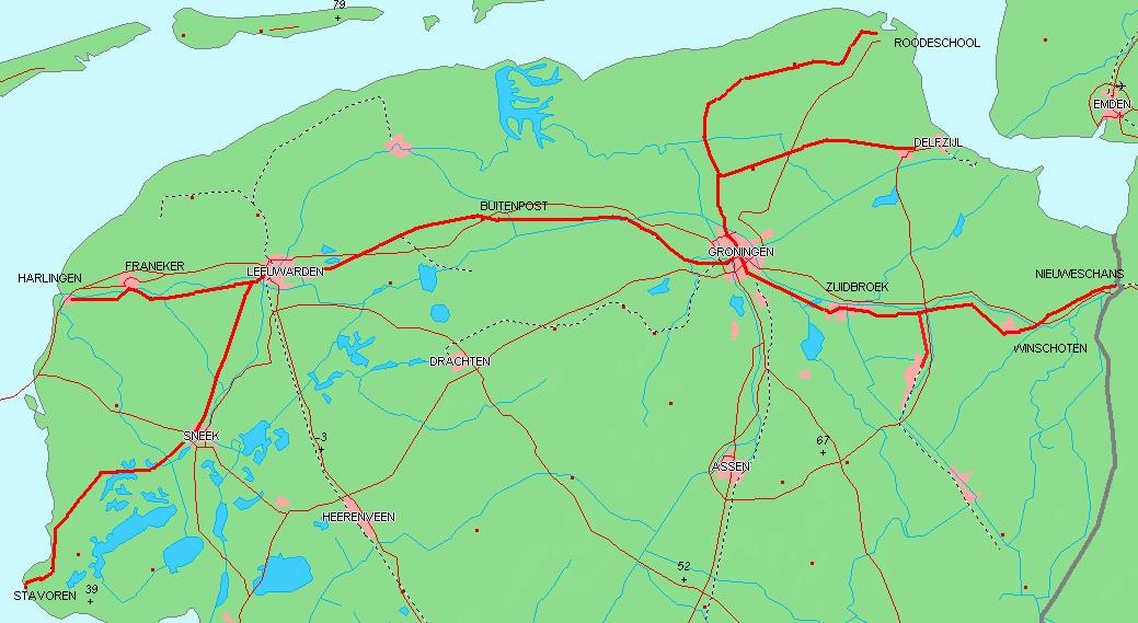 Gebaseerd op kaart van (vrije software gebaseerd op vrije database)